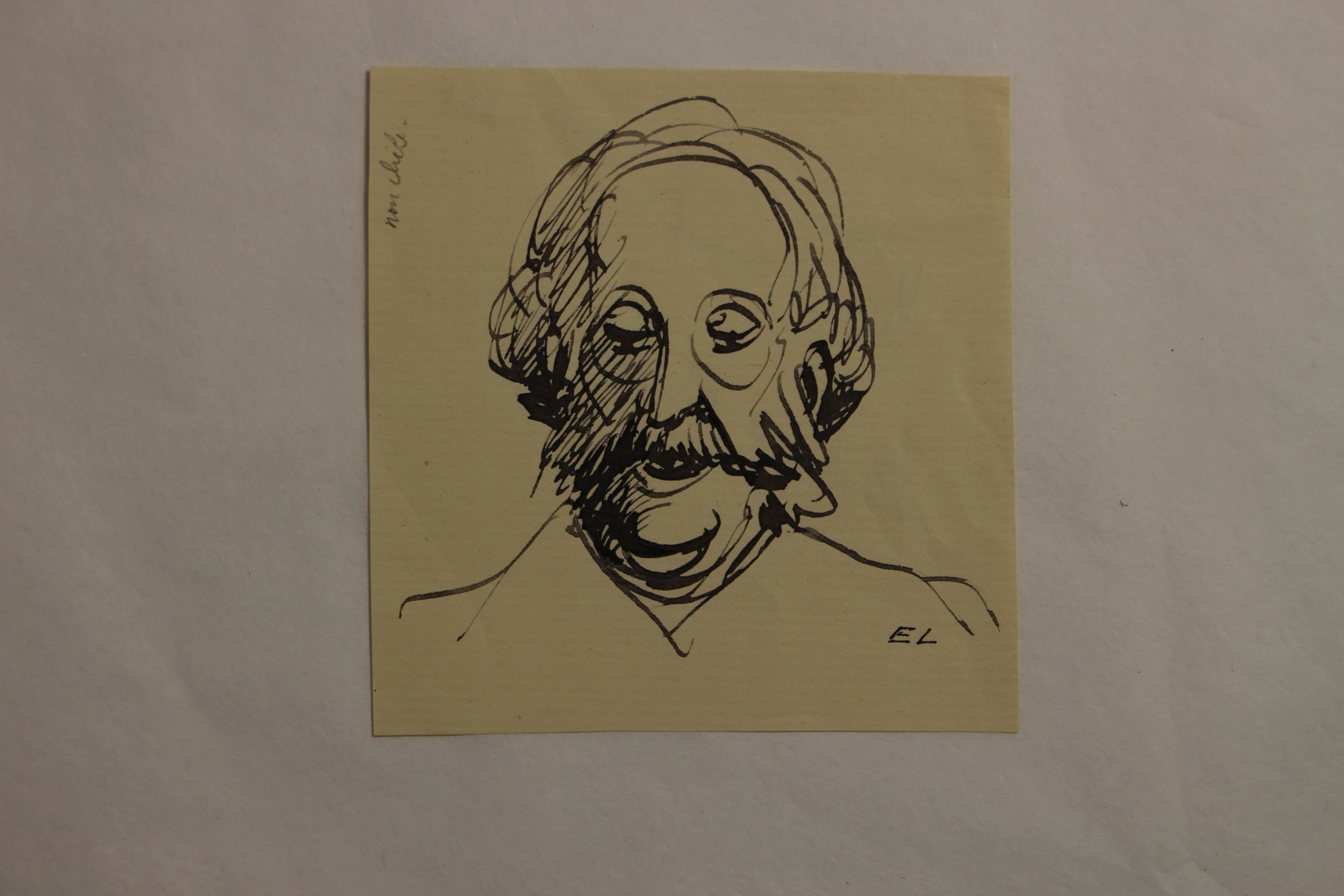 2007.0.321.M